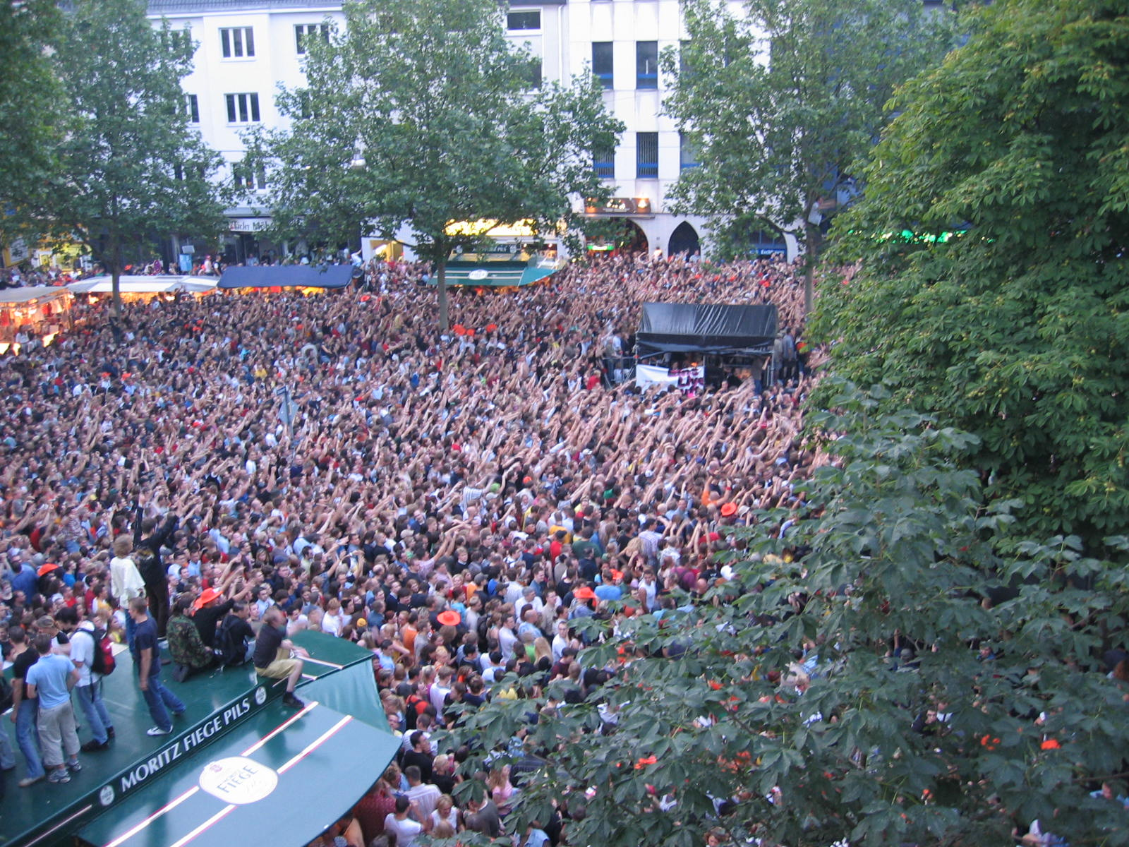 Samstag, 24.7.2004, Beginn des Auftritts der H-Blockx bei Bochum Total